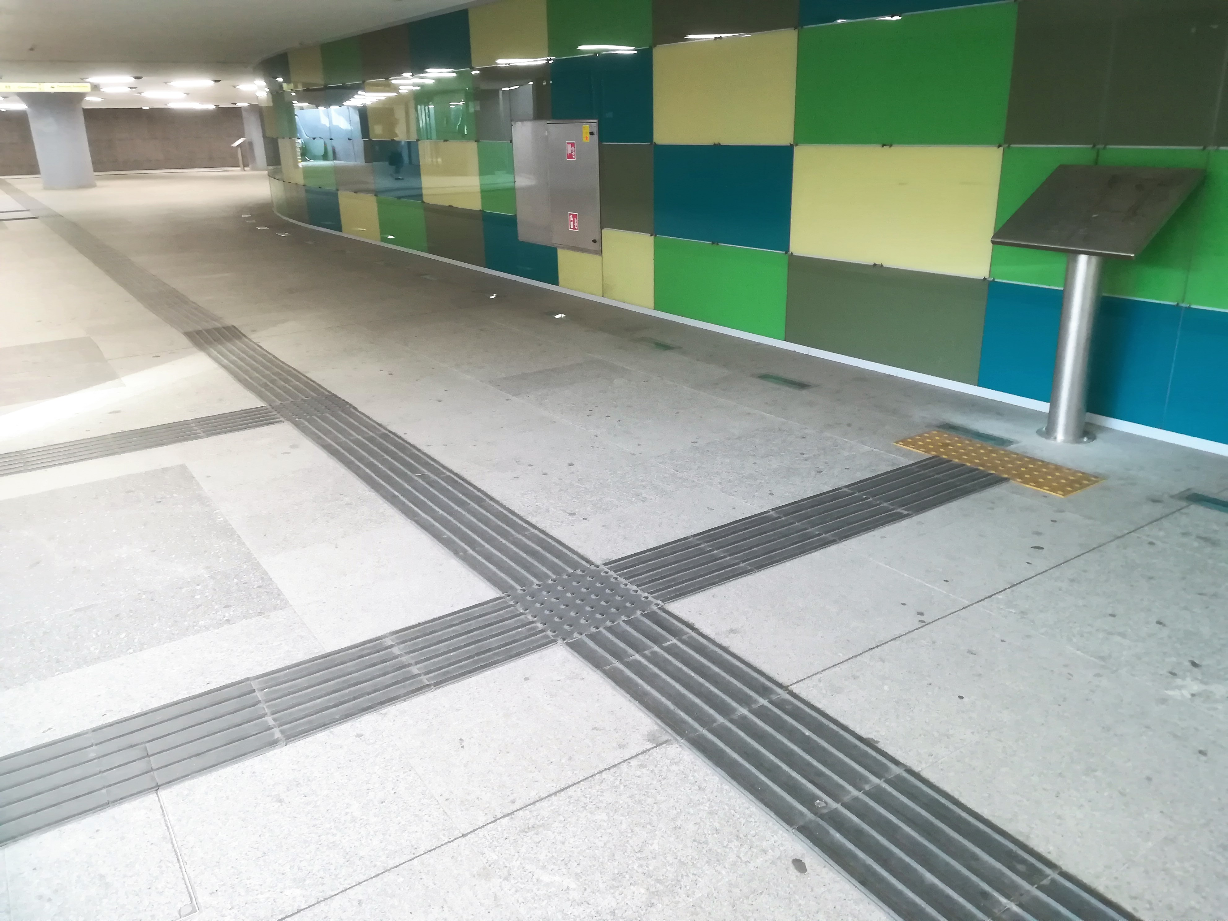 Poznań - Kaponiera (oznaczenia dla niewidomych).